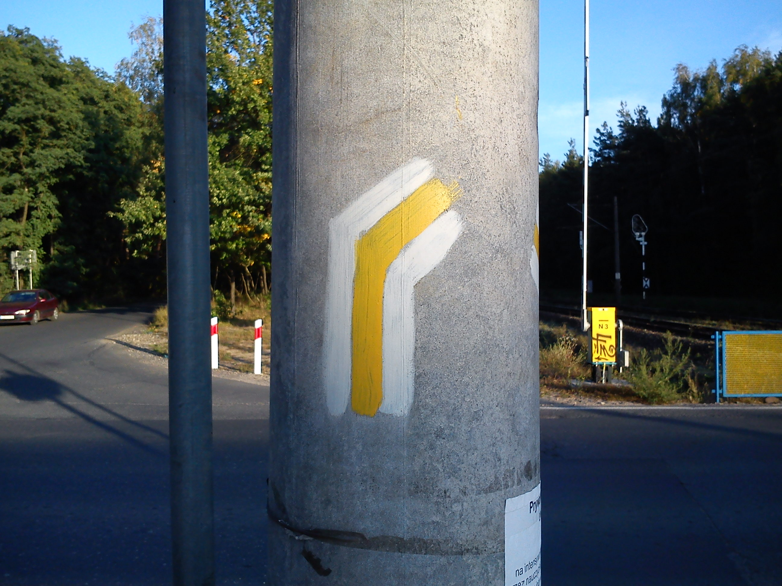 Yellow trail, Poznań, Umultowska street.